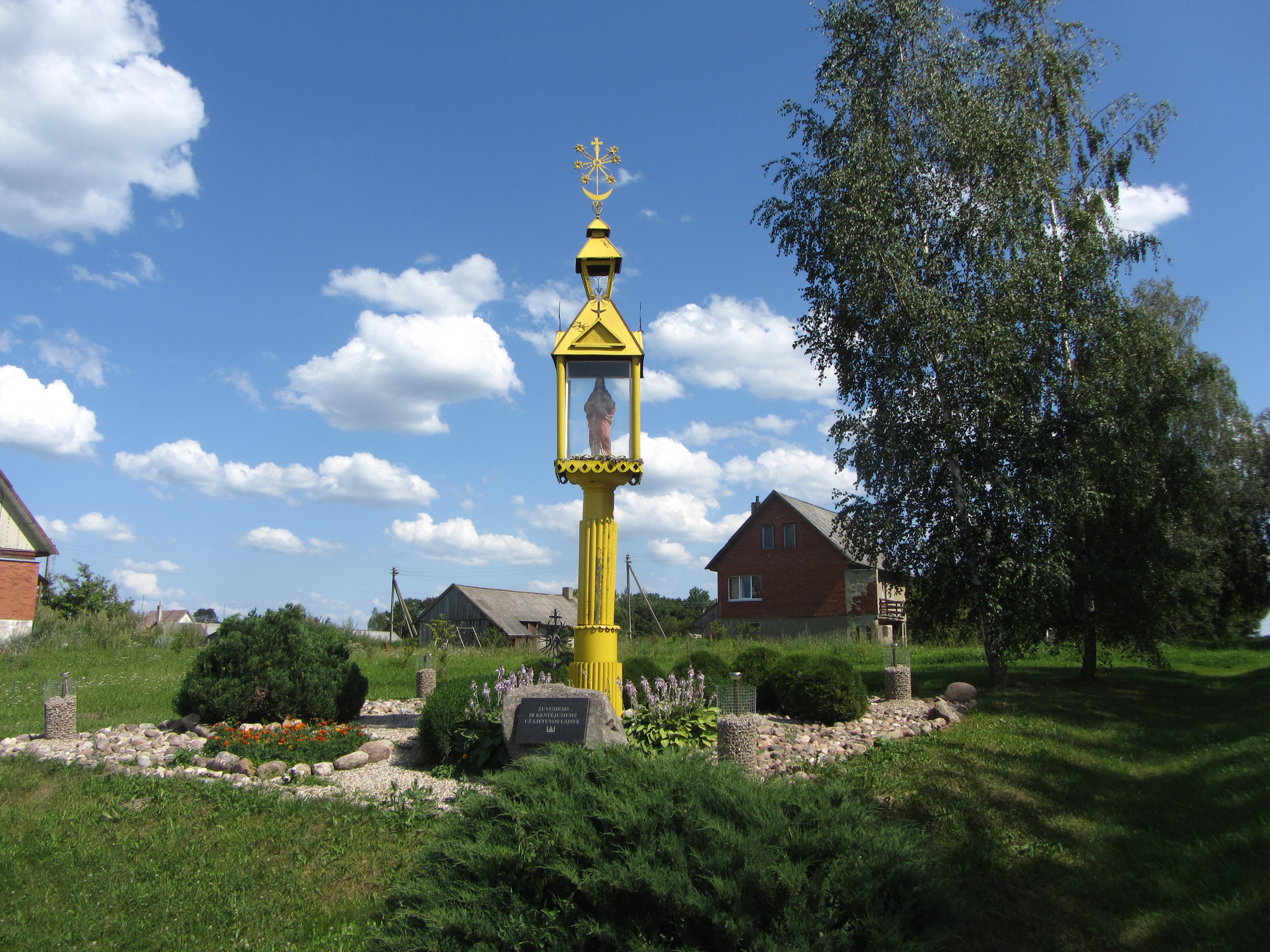 Gilūtos, Lithuania